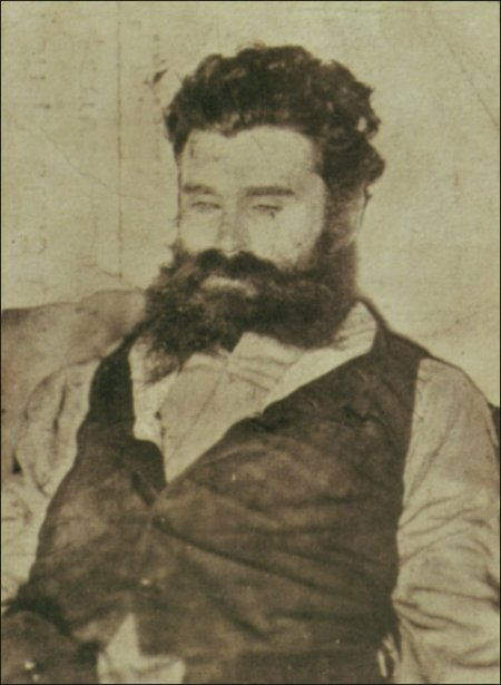 Foto de Manuel Buiça em 1908 depois de ter sido morto após ter cometido o regicidio.